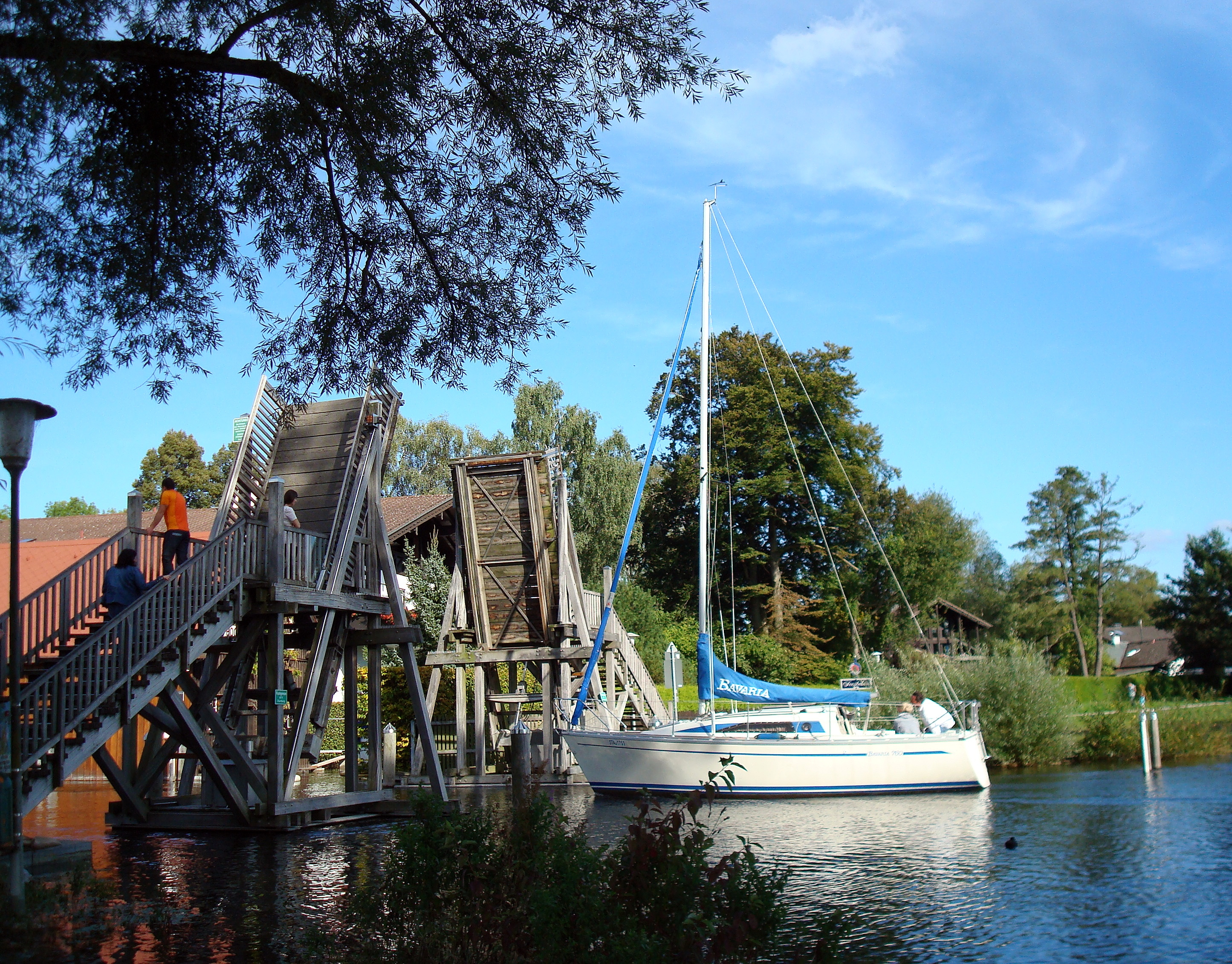 Nordende des Starnberger Sees, Durchfahrt in das Abflussgewässer des Sees, die Würm.